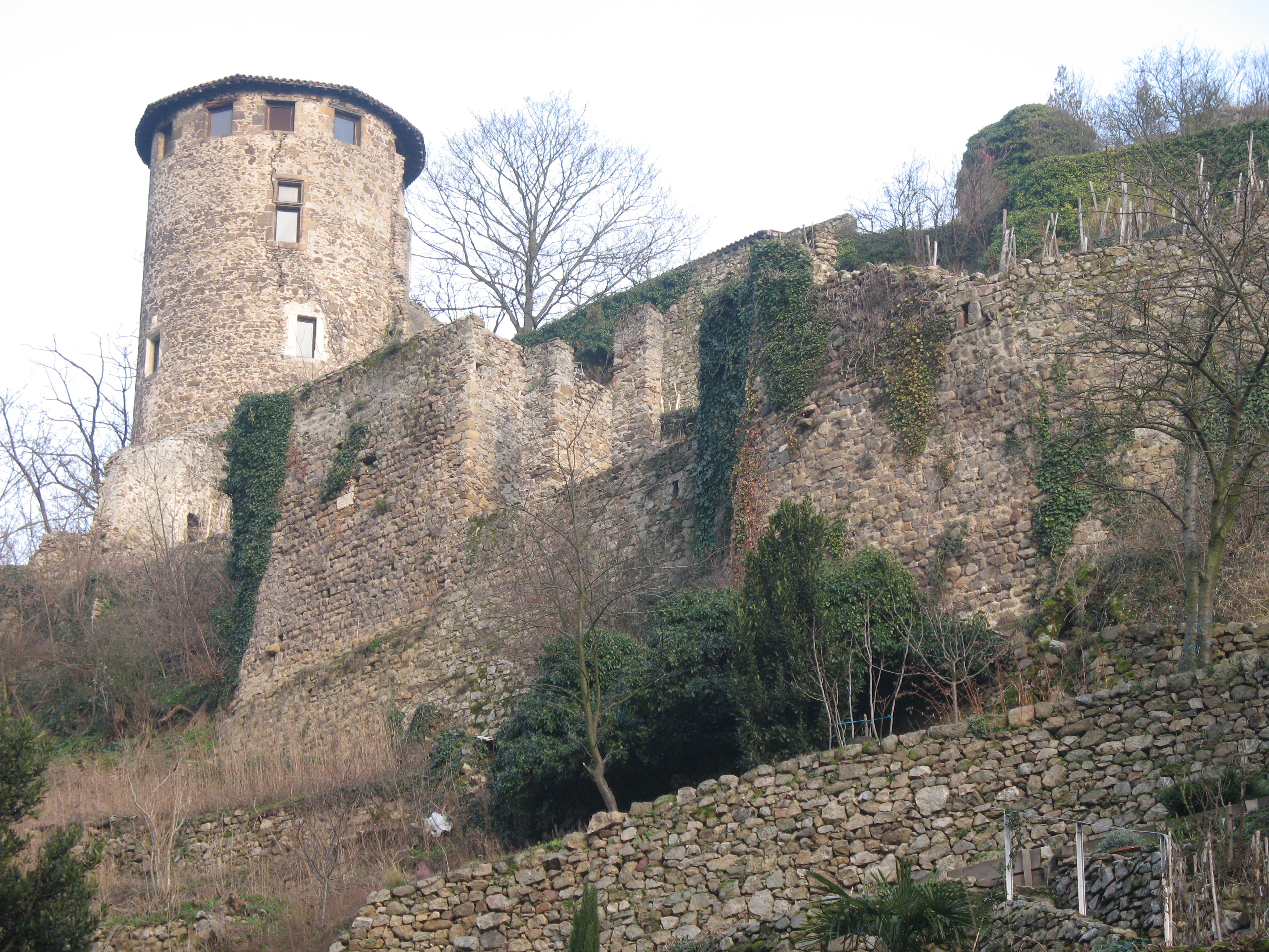 Château de Condrieu à Condrieu dans le Rhône.